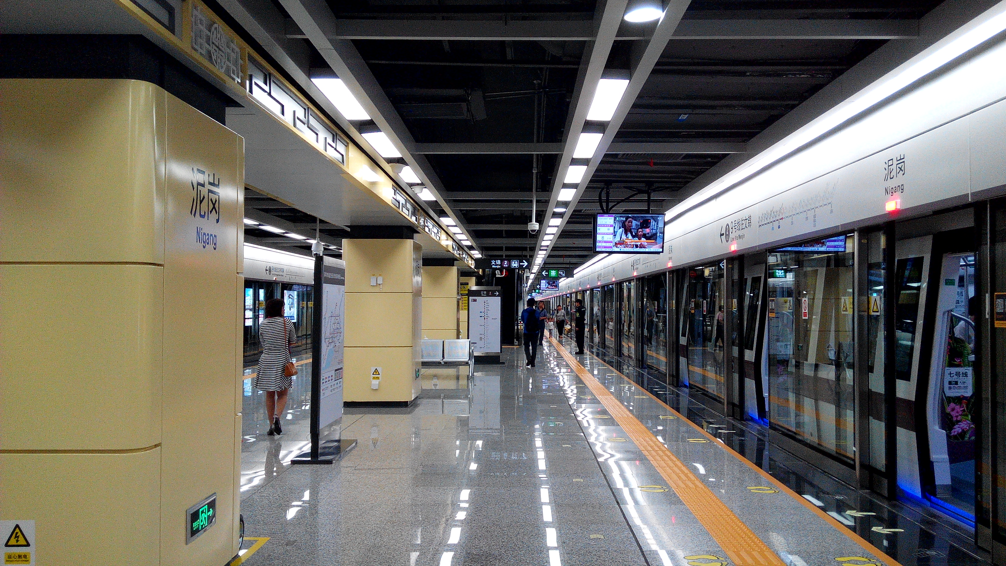 深圳地铁9号线 泥岗站站台